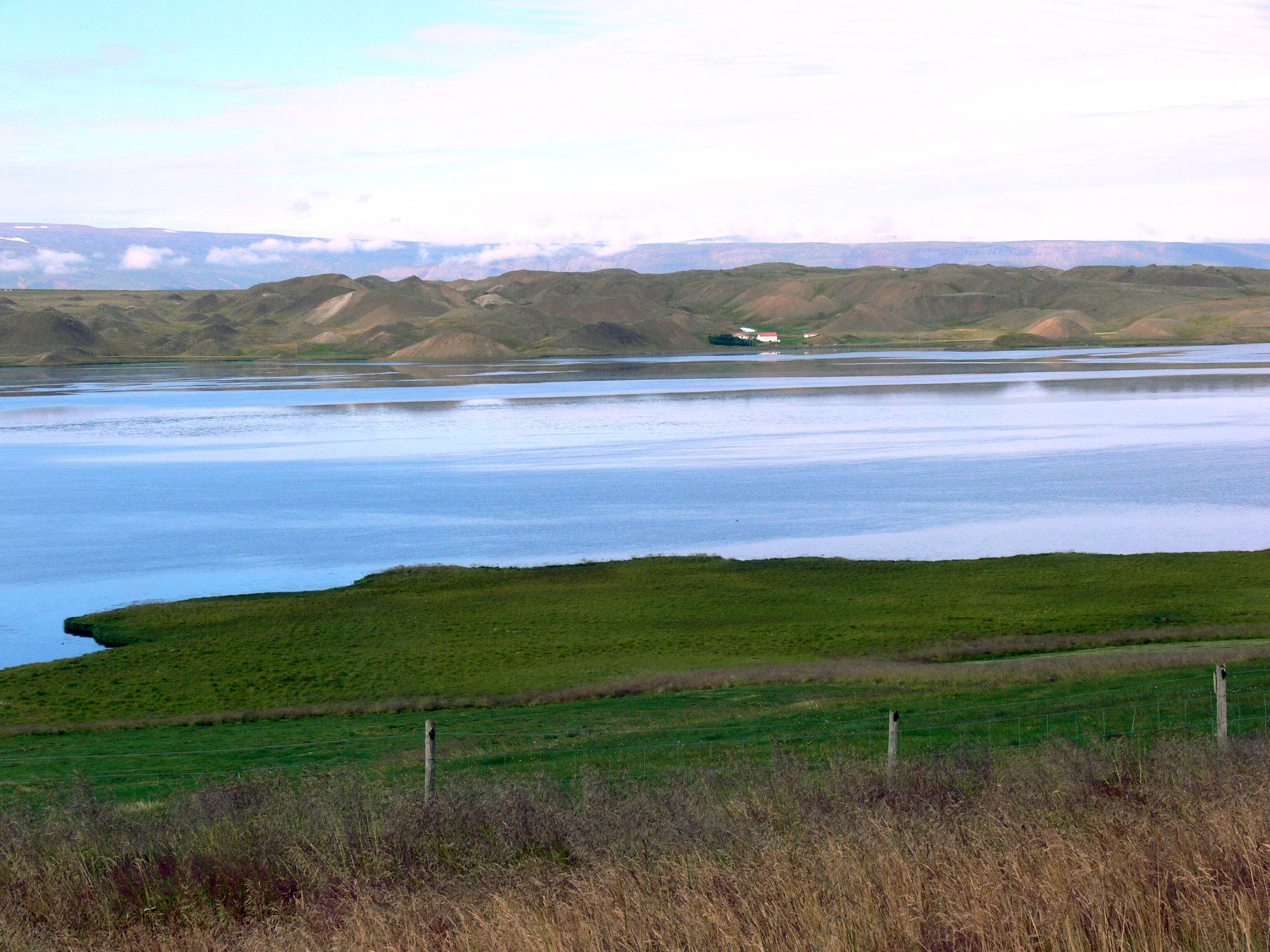 Vatnsdalur. Die Hügel in der Mitte stammen von katastrophalen Erdlawinen im 17. und 18. Jahrhundert. Sie stauten das Wasser des Flusses Vatnsdalsá auf und vernichteten so Weiden mancher ehemals reicher Bauernhöfe.